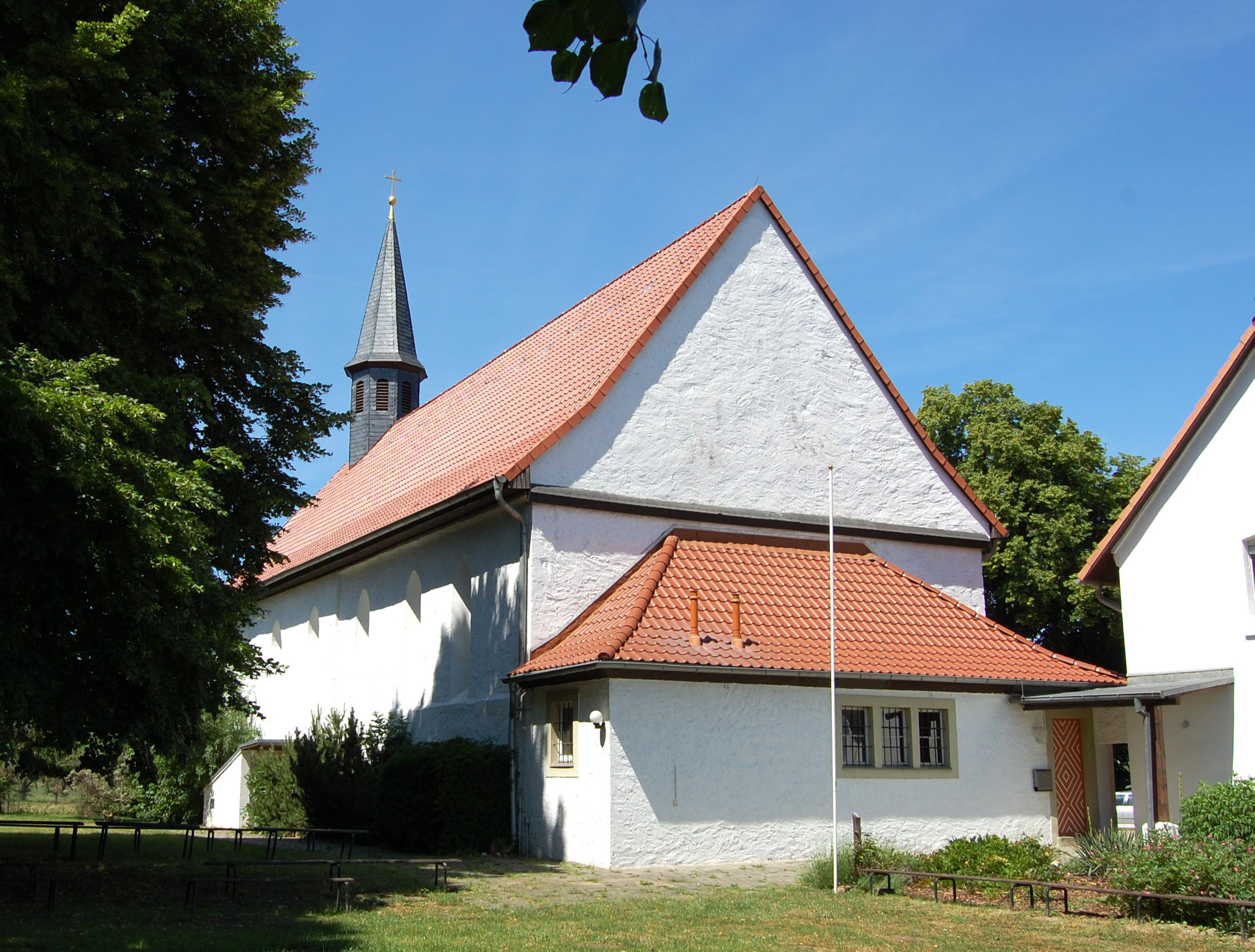 Katholische Kirche zum allerheiligsten Altarsakrament, ehemalige Wallfahrtskapelle